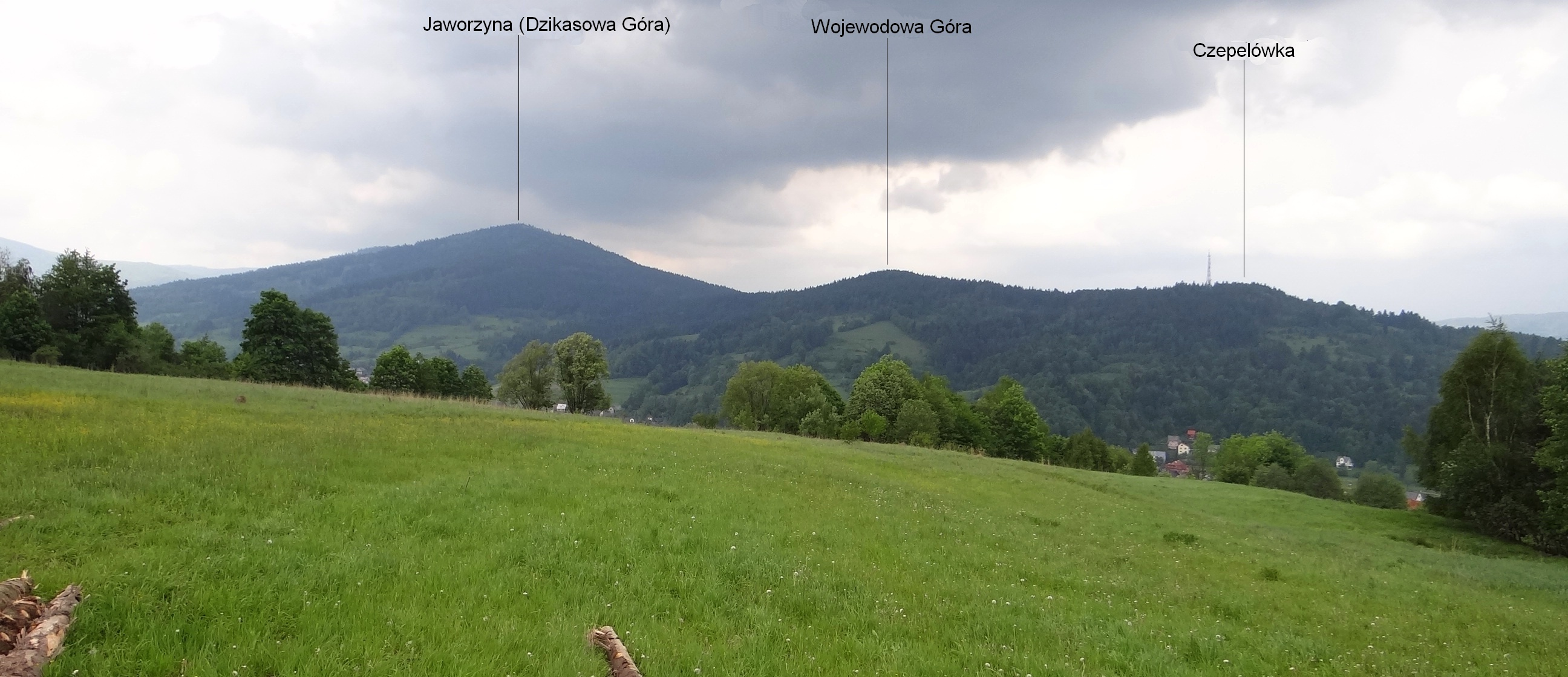 Dolina Stryszawki i Pasmo Solnisk, widok spod Magurki